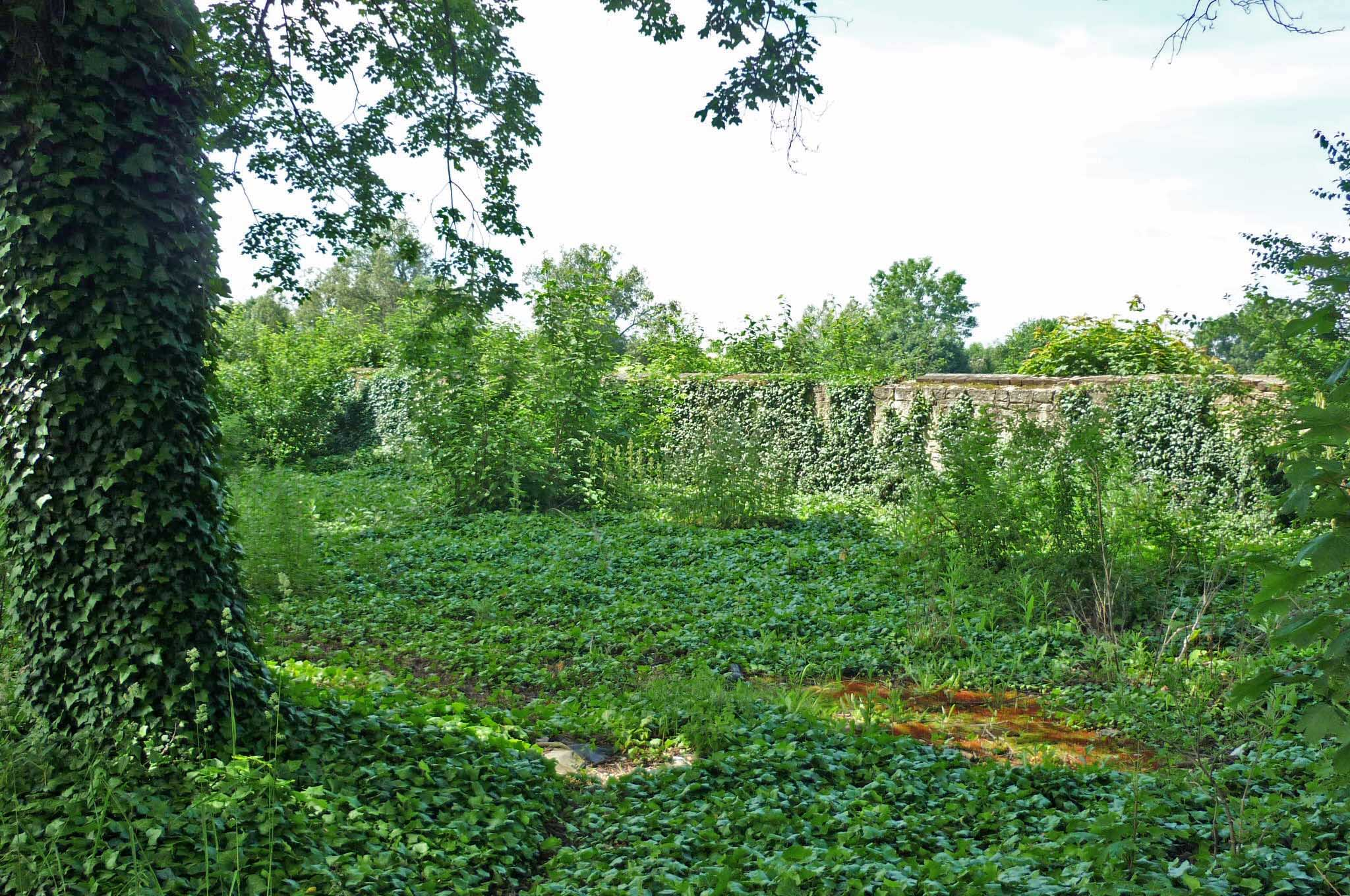 Ehemaliger Neuer Jüdischer Friedhof in Liebeschitz bei Saaz, angelegt 1897